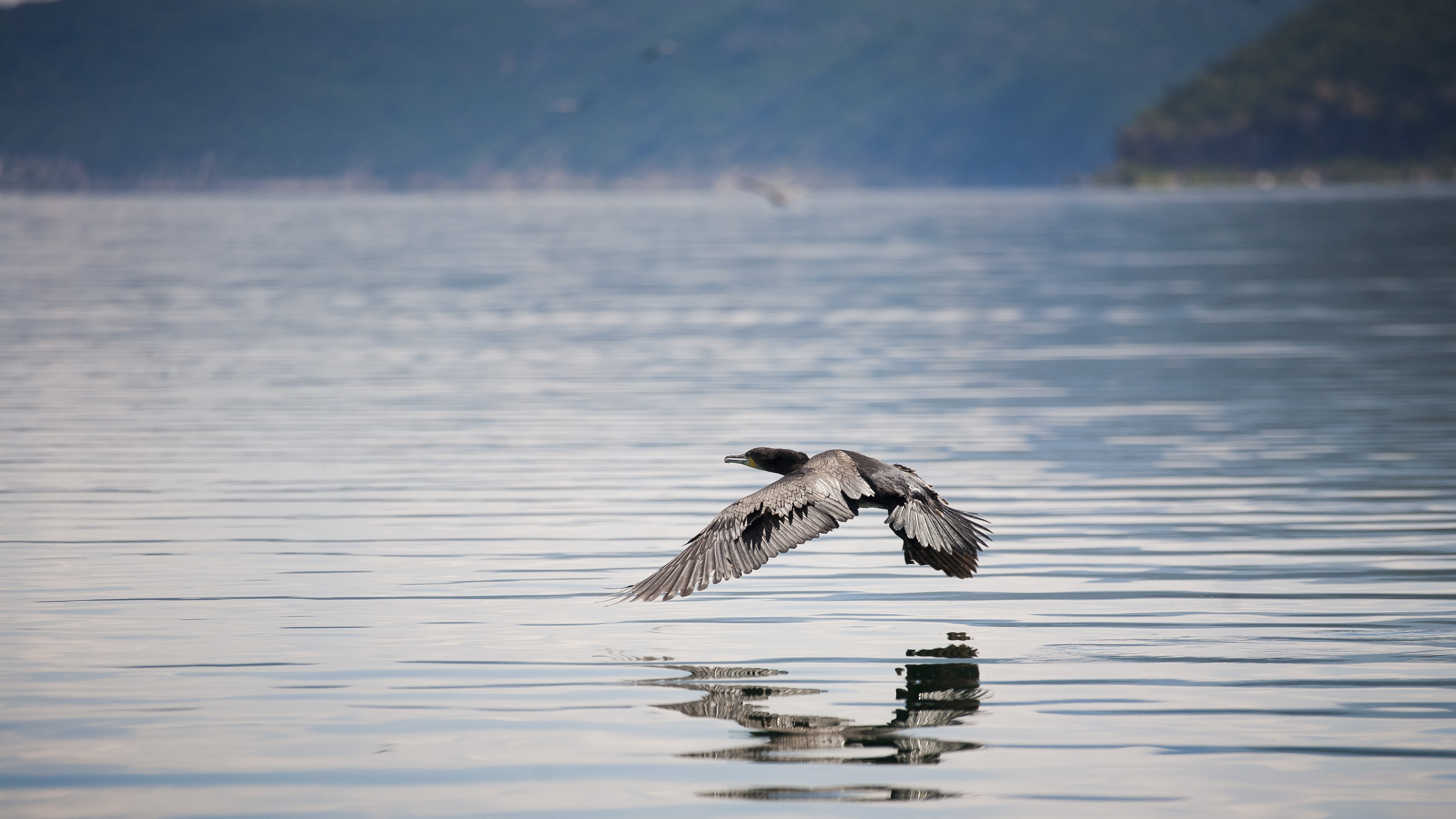 Kormoran vo let